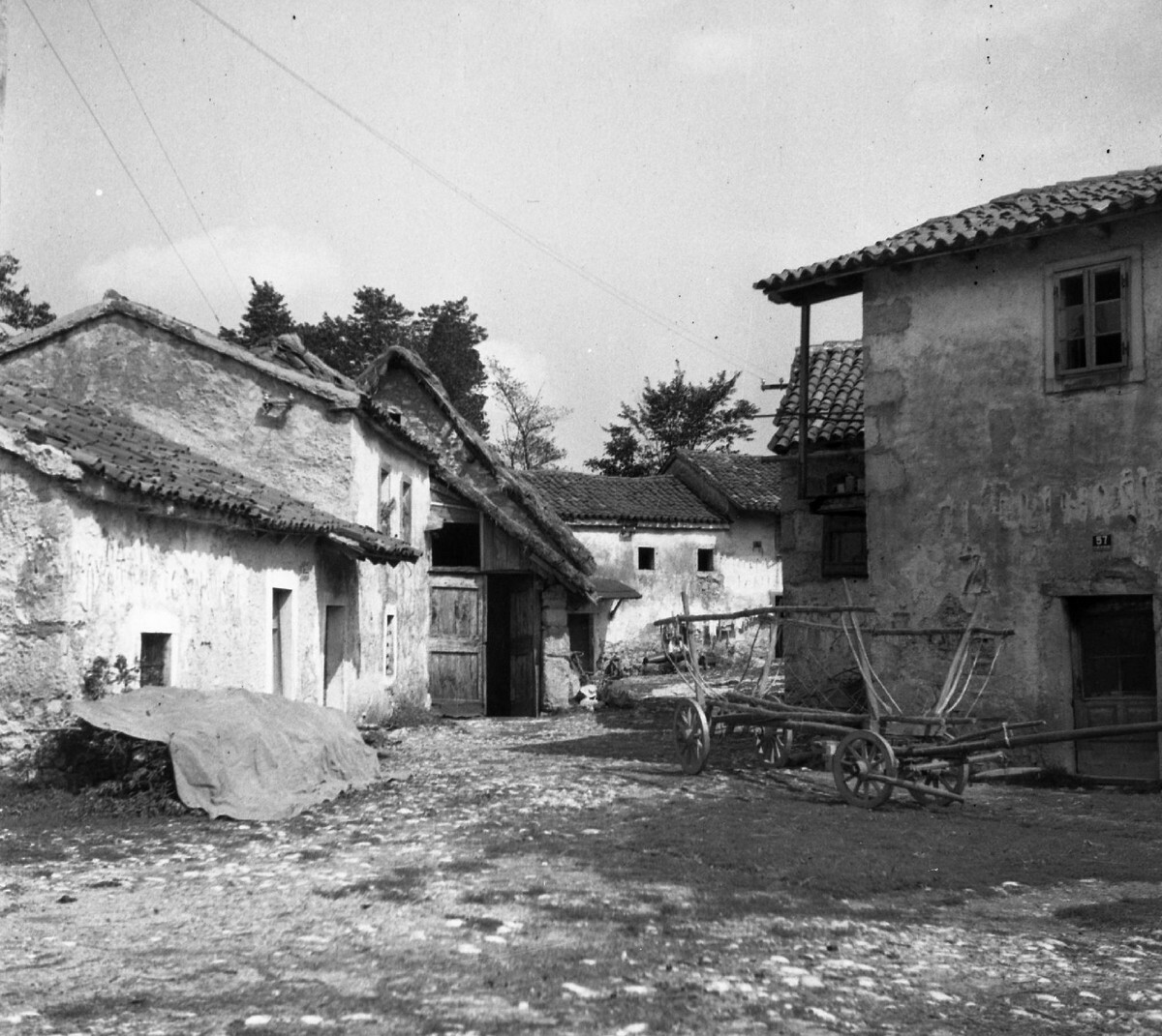 Del vasi Poljane.